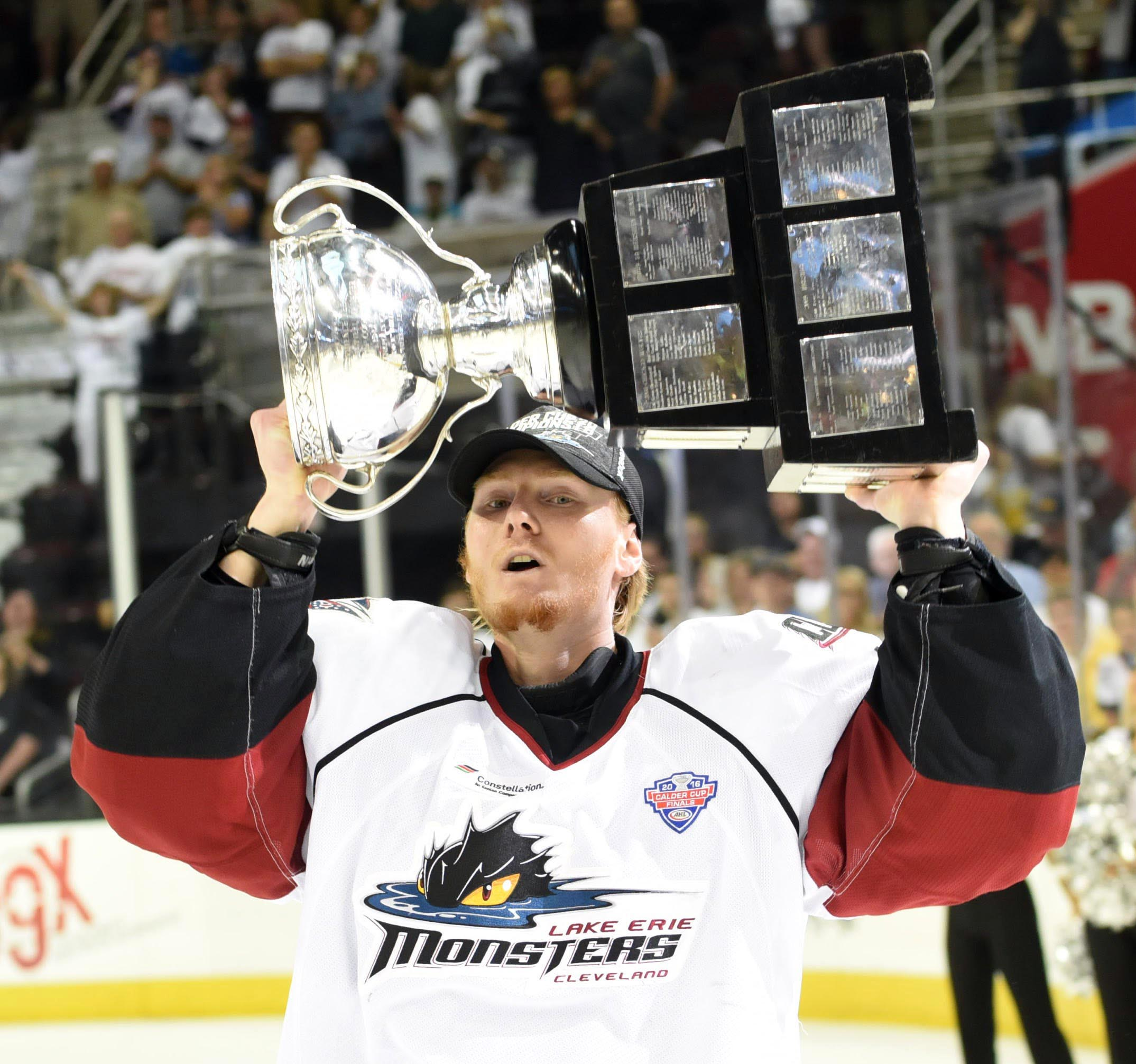 Photo: John Saraya/AHL